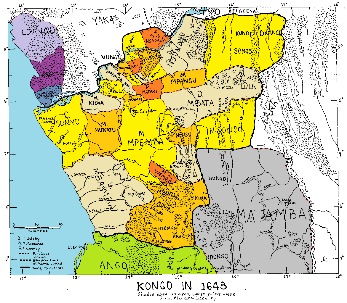 Versión coloreada de File:Kongo 1648.tif